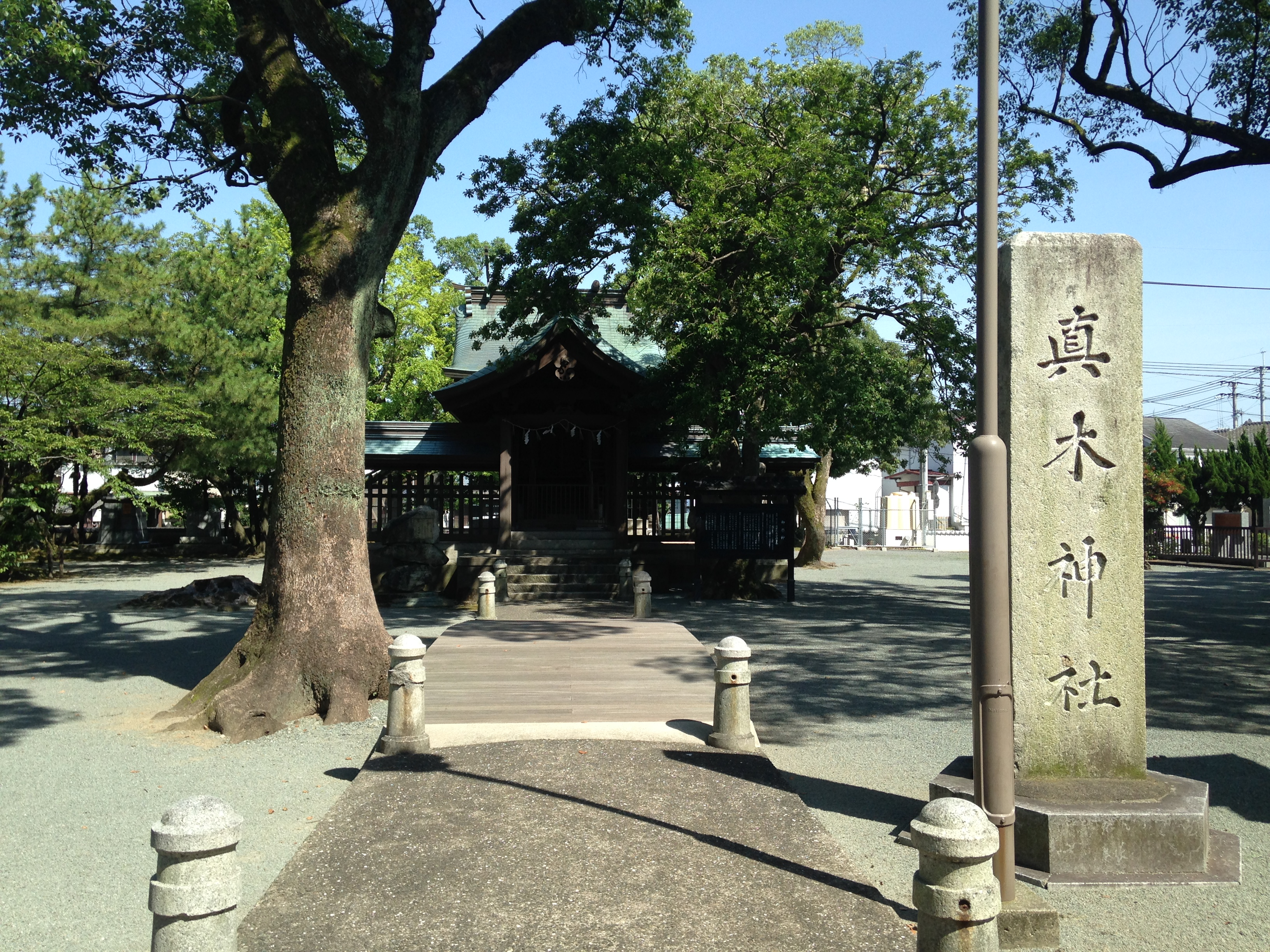 水天宮境内の真木神社